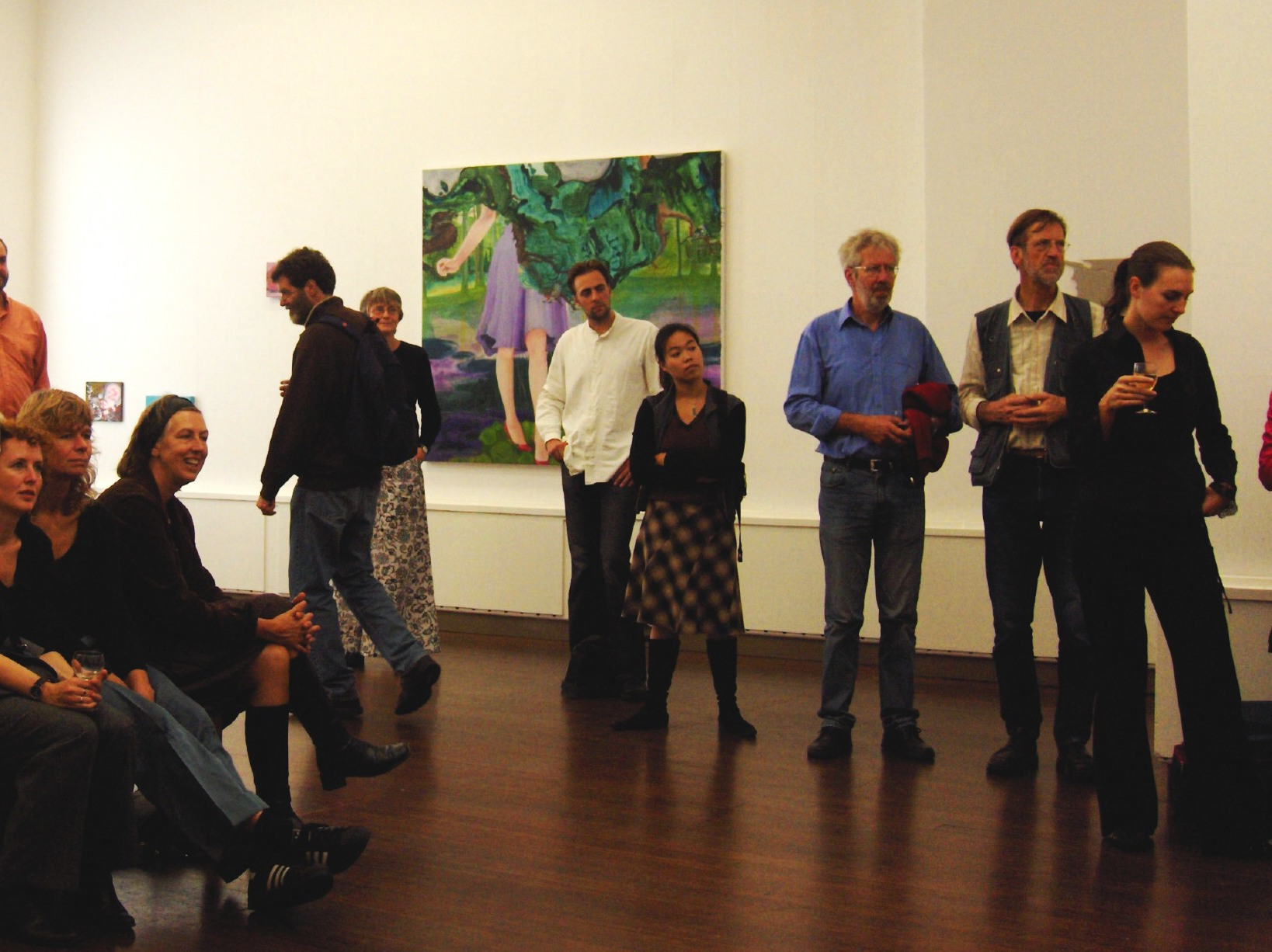 Malfermo de ekspozicio en artgalerio en Groningen